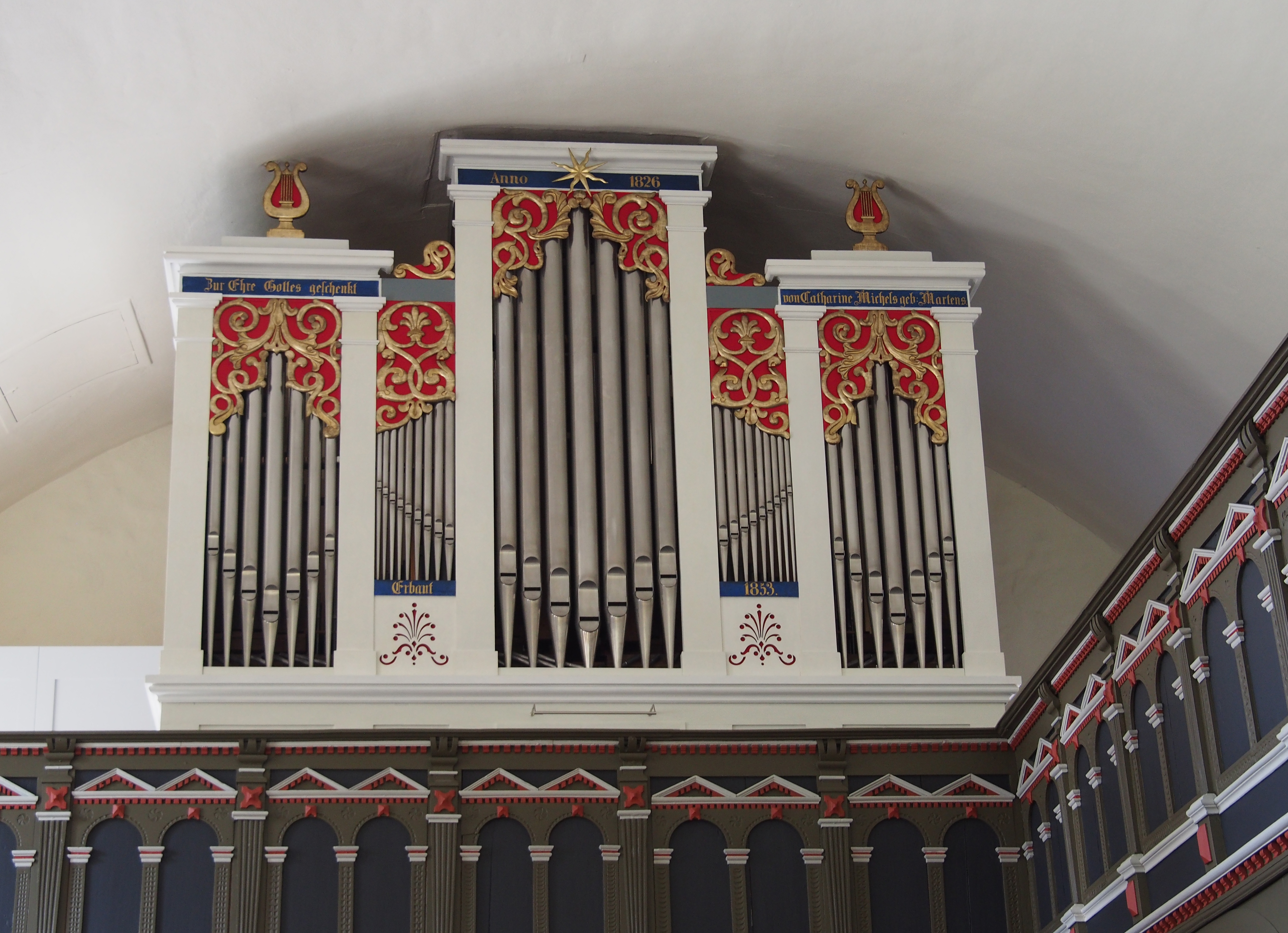 Eduard-Meyer-Orgel von 1853 in der Kirche St. Marien, Eldingen (Landkreis Celle)